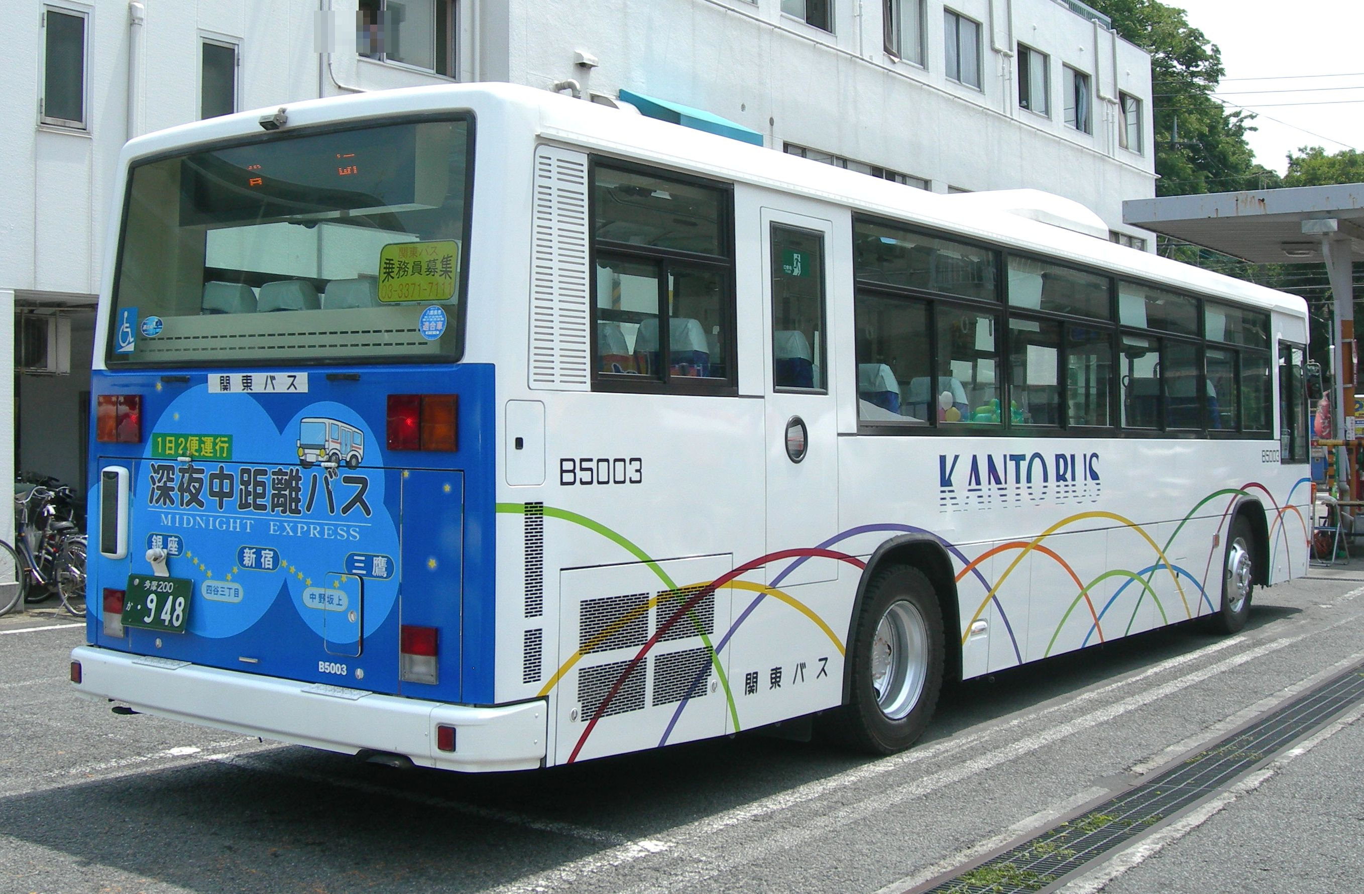 関東バスの深夜中距離バス銀座・新宿～三鷹線専用車の後部